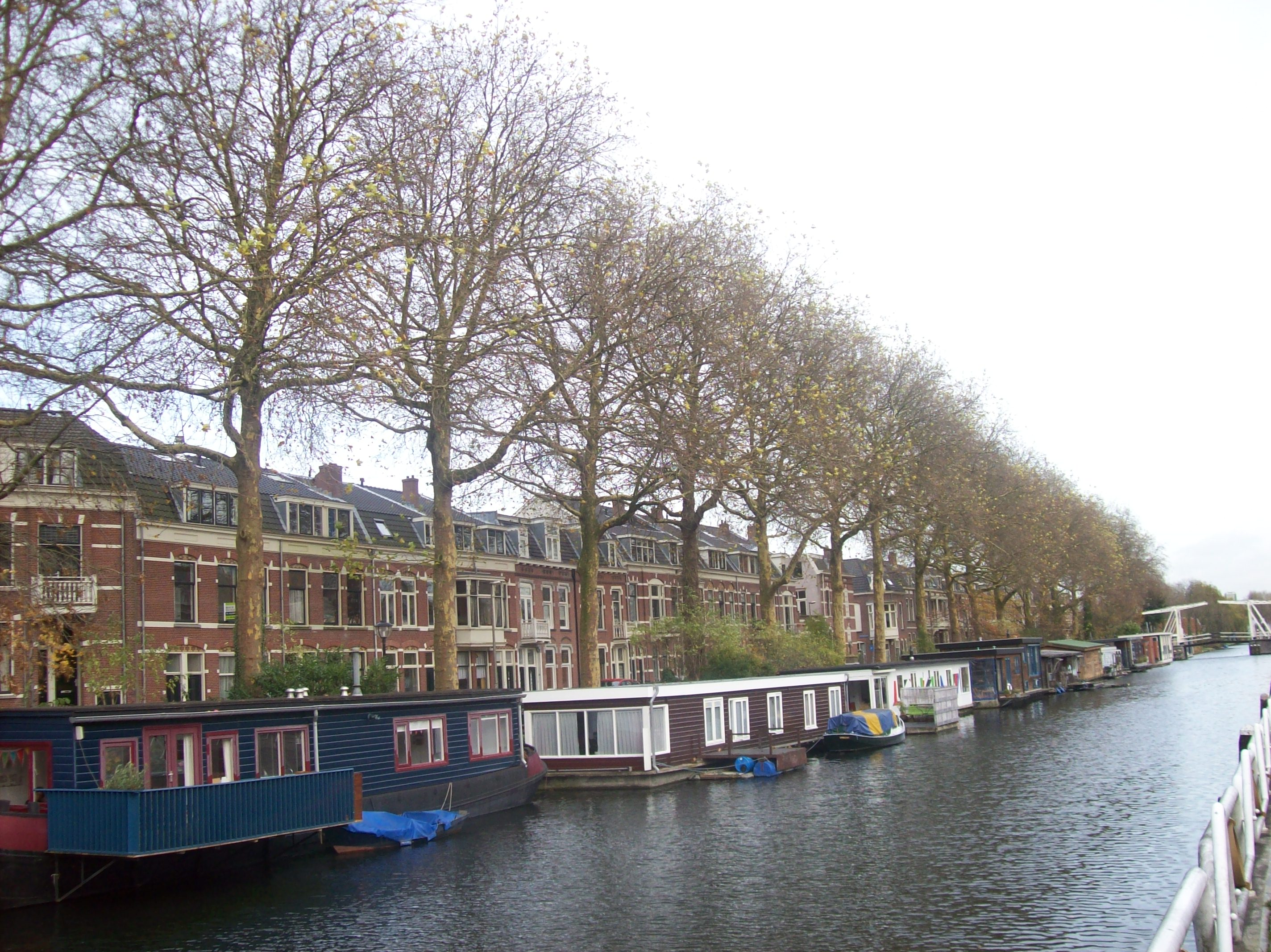 Huizen langs de Leidse Rijn in Utrecht-Lombok.